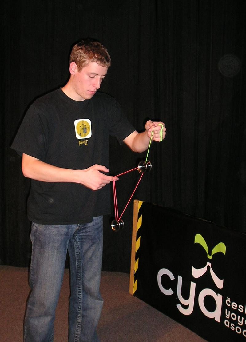 Yoyo - kategorie 3A - předvádí Ondřej Šedivý - Sheda